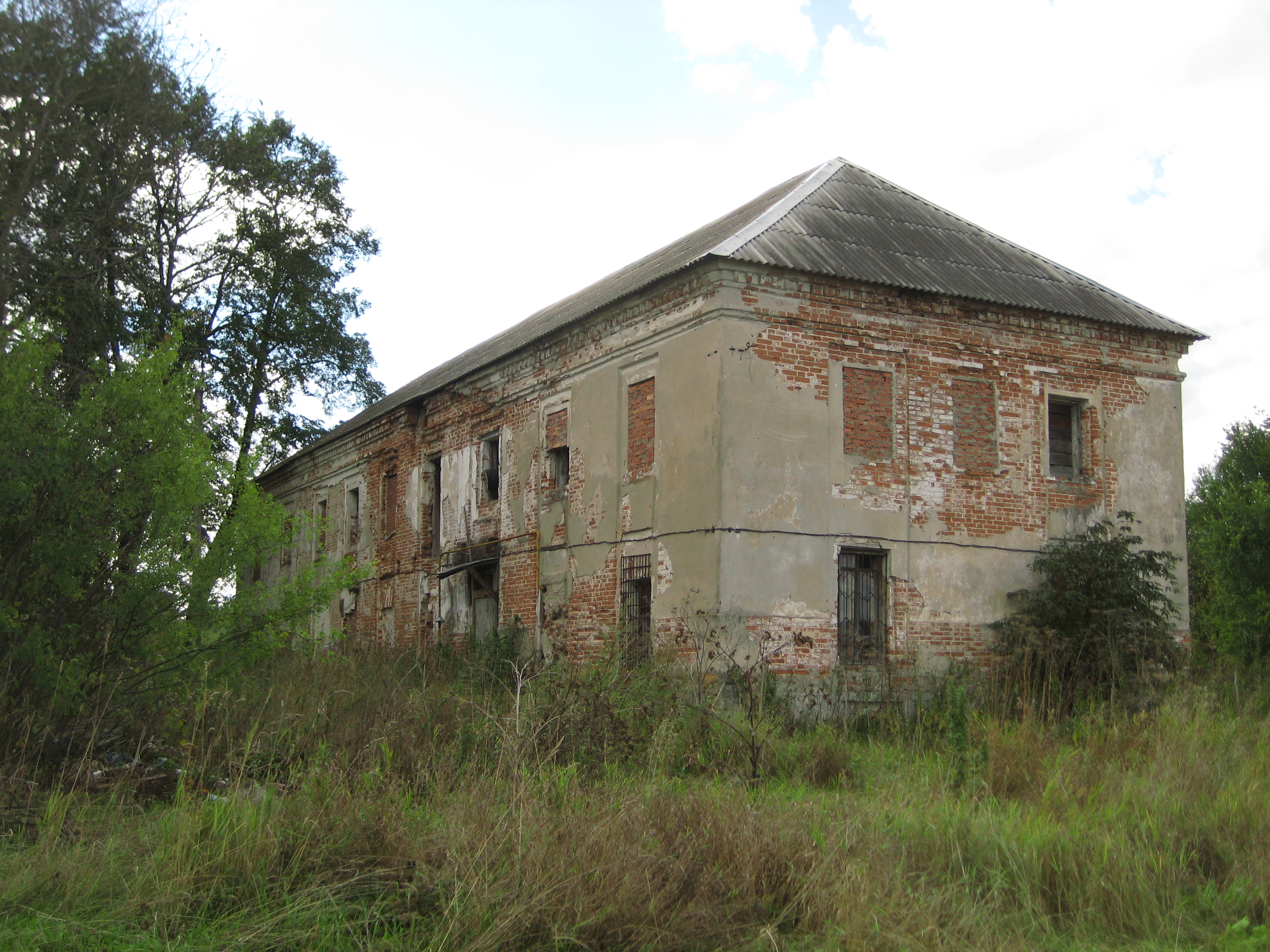 Троицкое, Калужская область. Флигель, руины